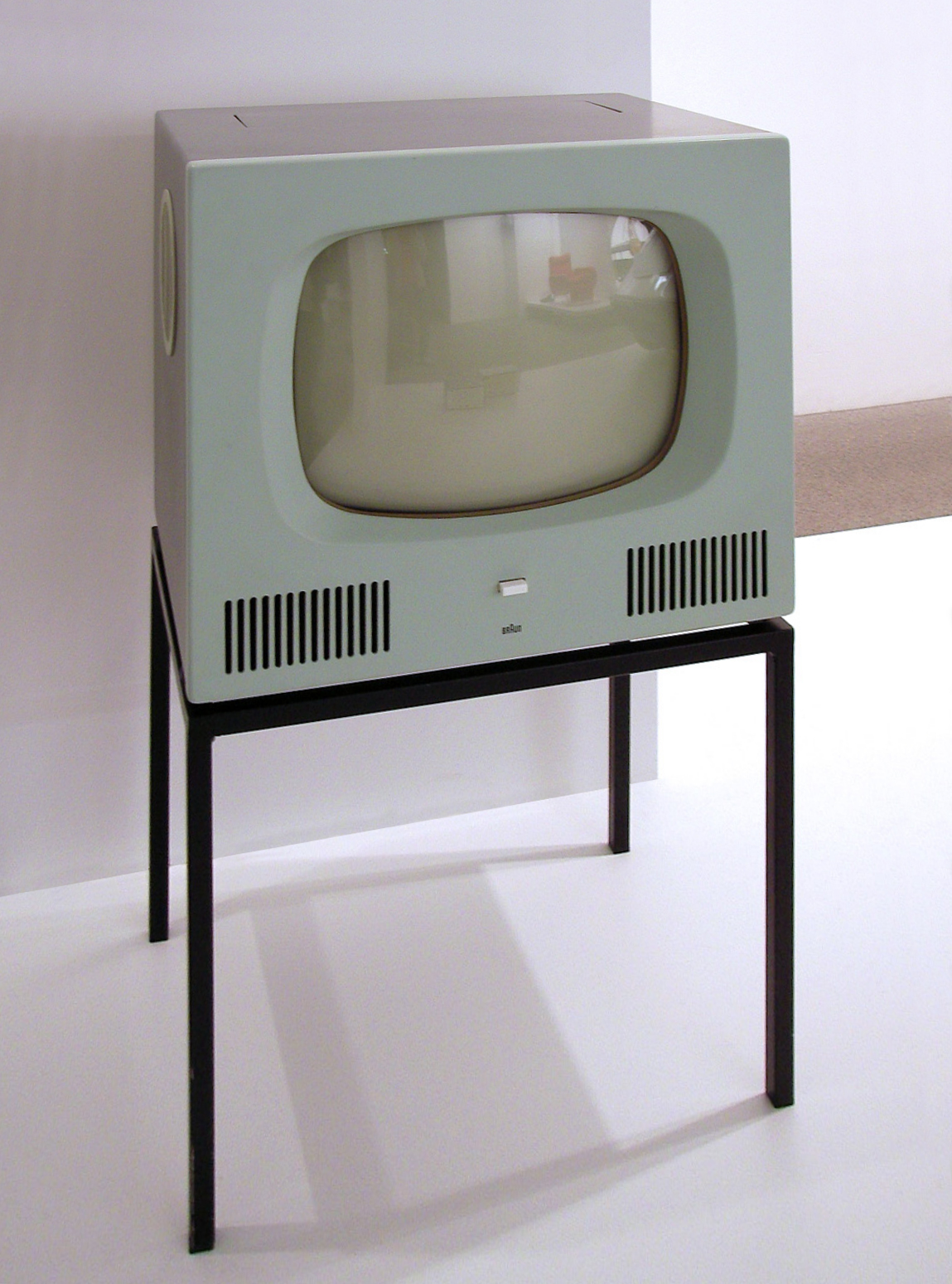 Fernsehgerät HF 1, 1958, Pinakothek der Moderne, München Hersteller: Max Braun, Frankfurt a. M., Deutschland Herbert Hirche 1910-2002